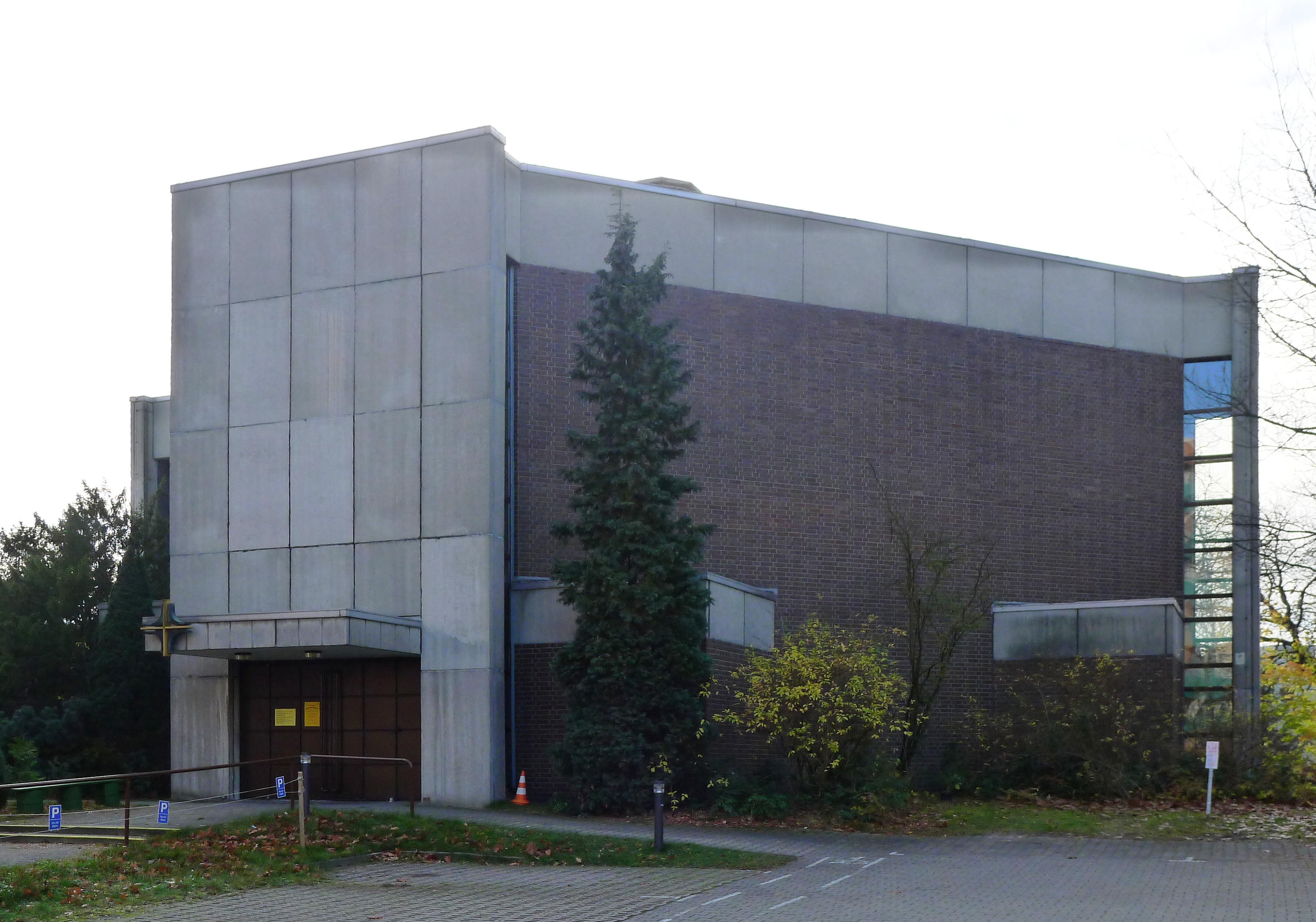 Blick auf die Kirche